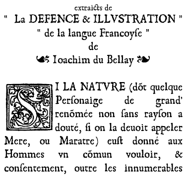 Exemple de texte réalisé avec la fonte 1550.ttf, à l'imitation des livres imprimés au milieu du XVIeme siècle. Cette police est librement téléchargeable sur le site , rubrique 1550. Les caractères proviennent directement d'ouvrages imprimés au milieu du XVI siècle, numérisés et mis en ligne sur le site BnF/Gallica. Les lettrines sont issues du livre de Geofroy Tory "Champ Fleury". Par Frédéric